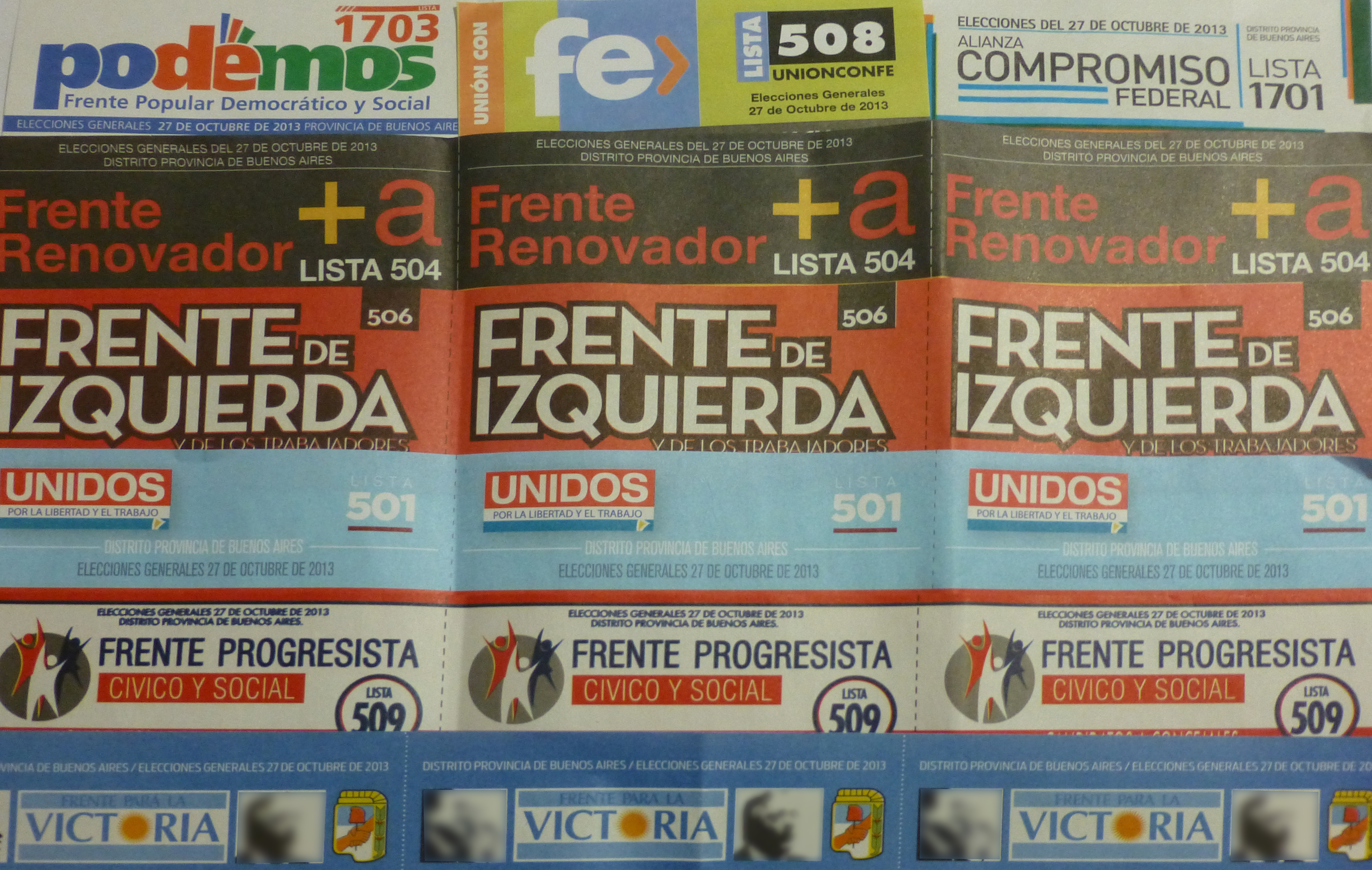 Boletas electorales de todos los partidos políticos que participaron de las elecciones legislativas de Argentina de 2013.